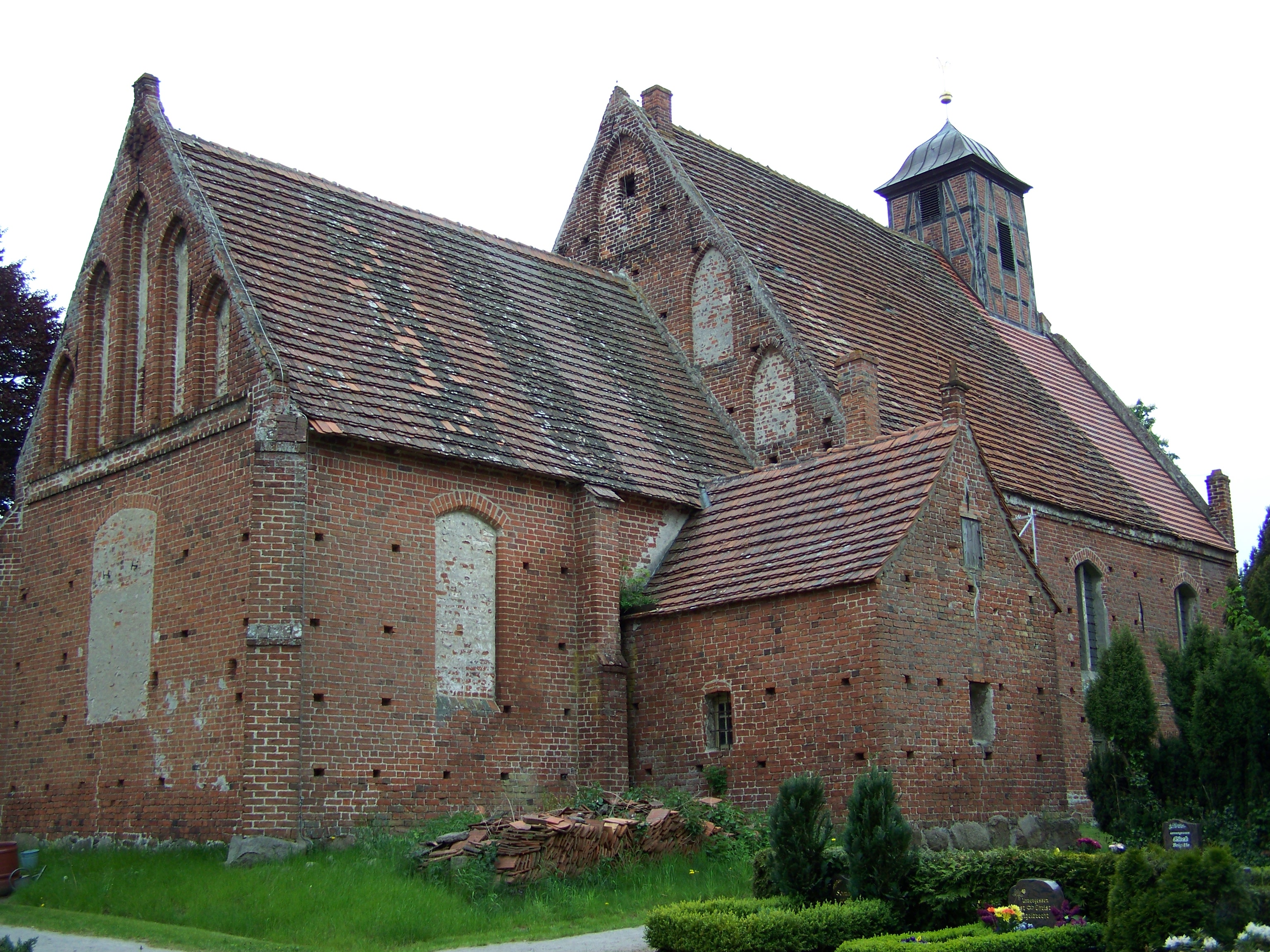 Die Kirche Samtens auf Rügen, Blick von Nordost (2009-05-17).